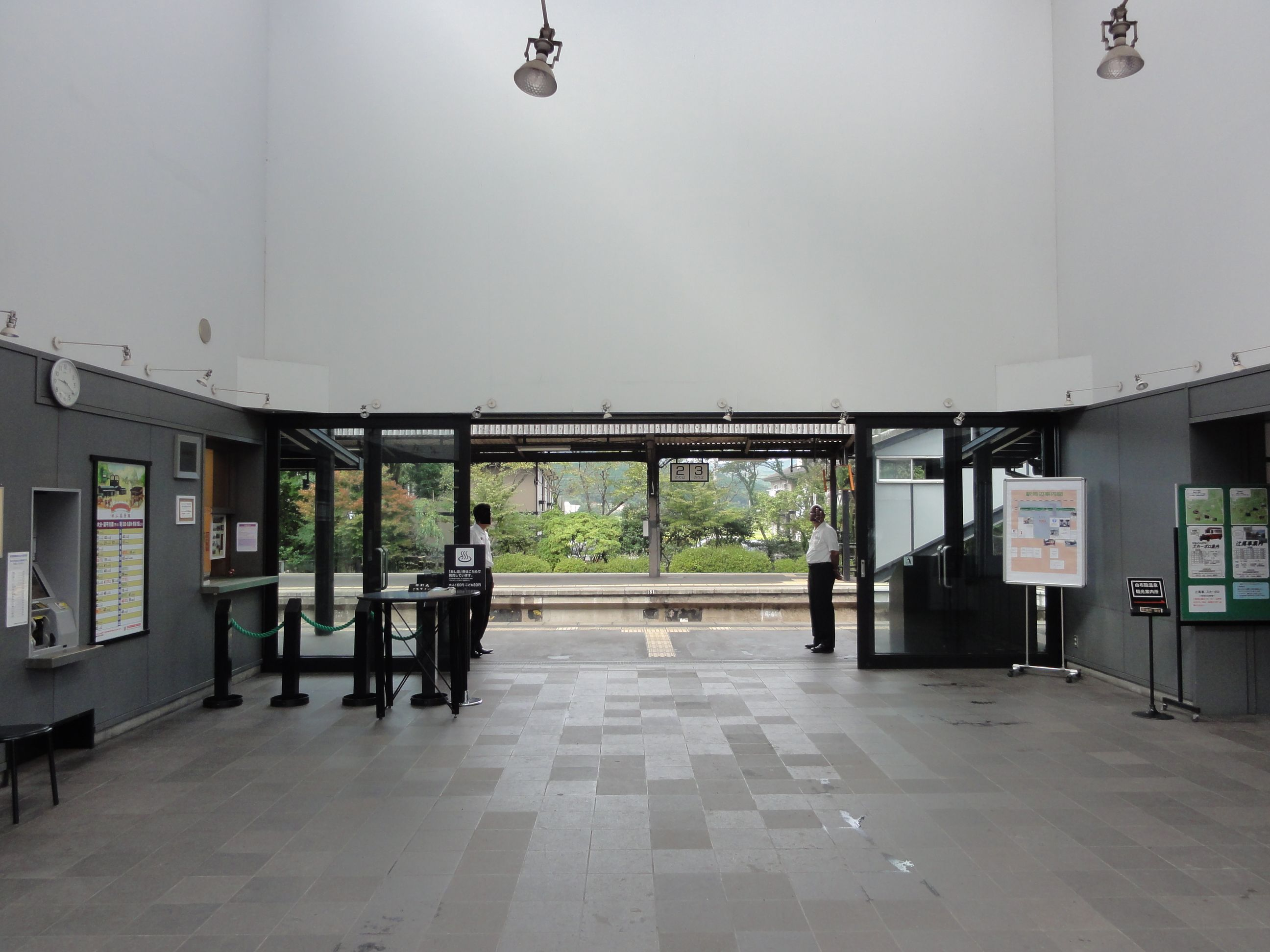 由布院駅改札口